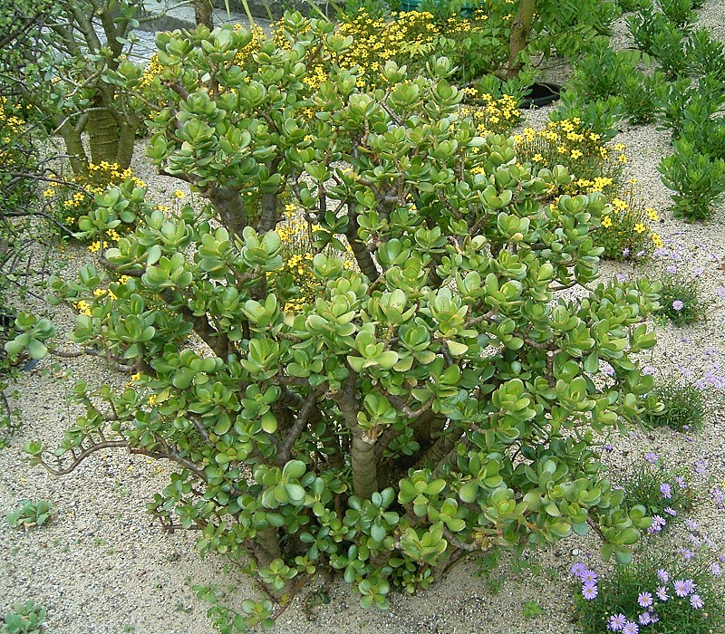 Crassula ovata